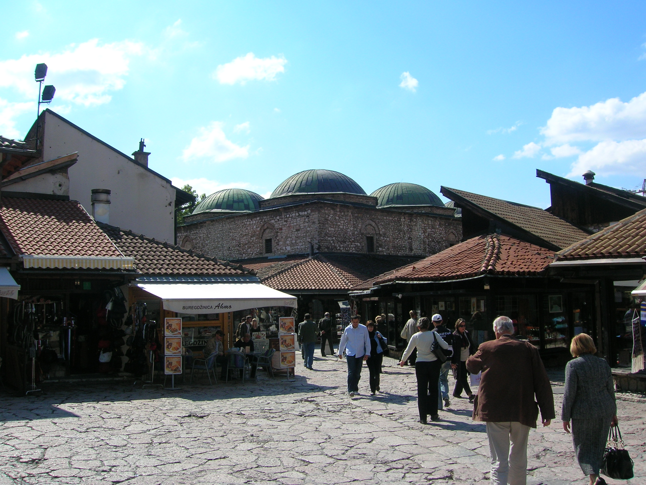 Baščaršija square